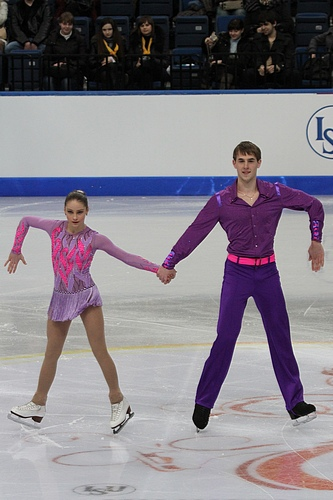 Юлия Лаврентьева и Юрий Рудык (Украина) на чемпионате мира по фигурному катанию среди юниоров 2012